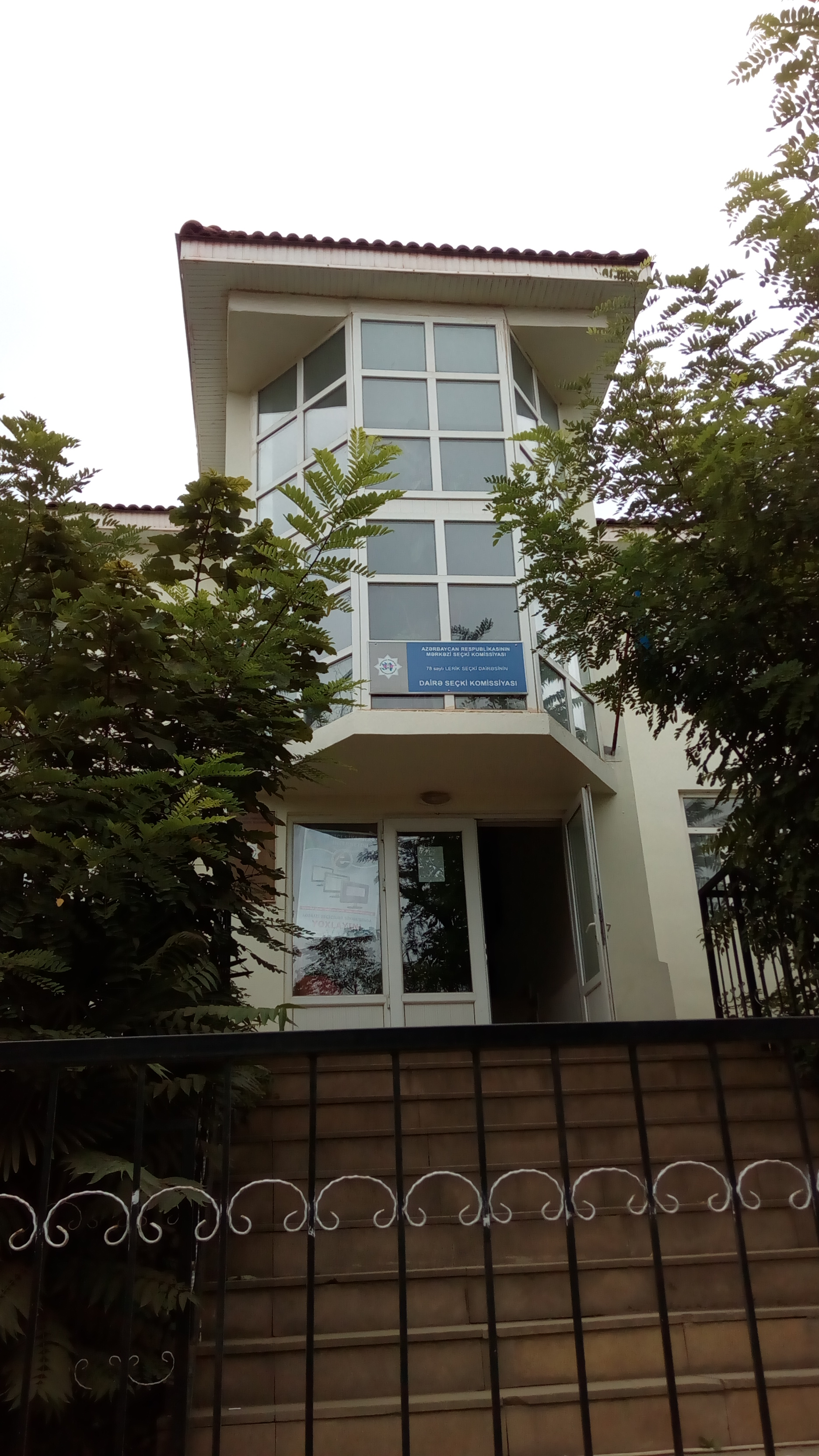 78 saylı Lerik Seçki Dairəsi